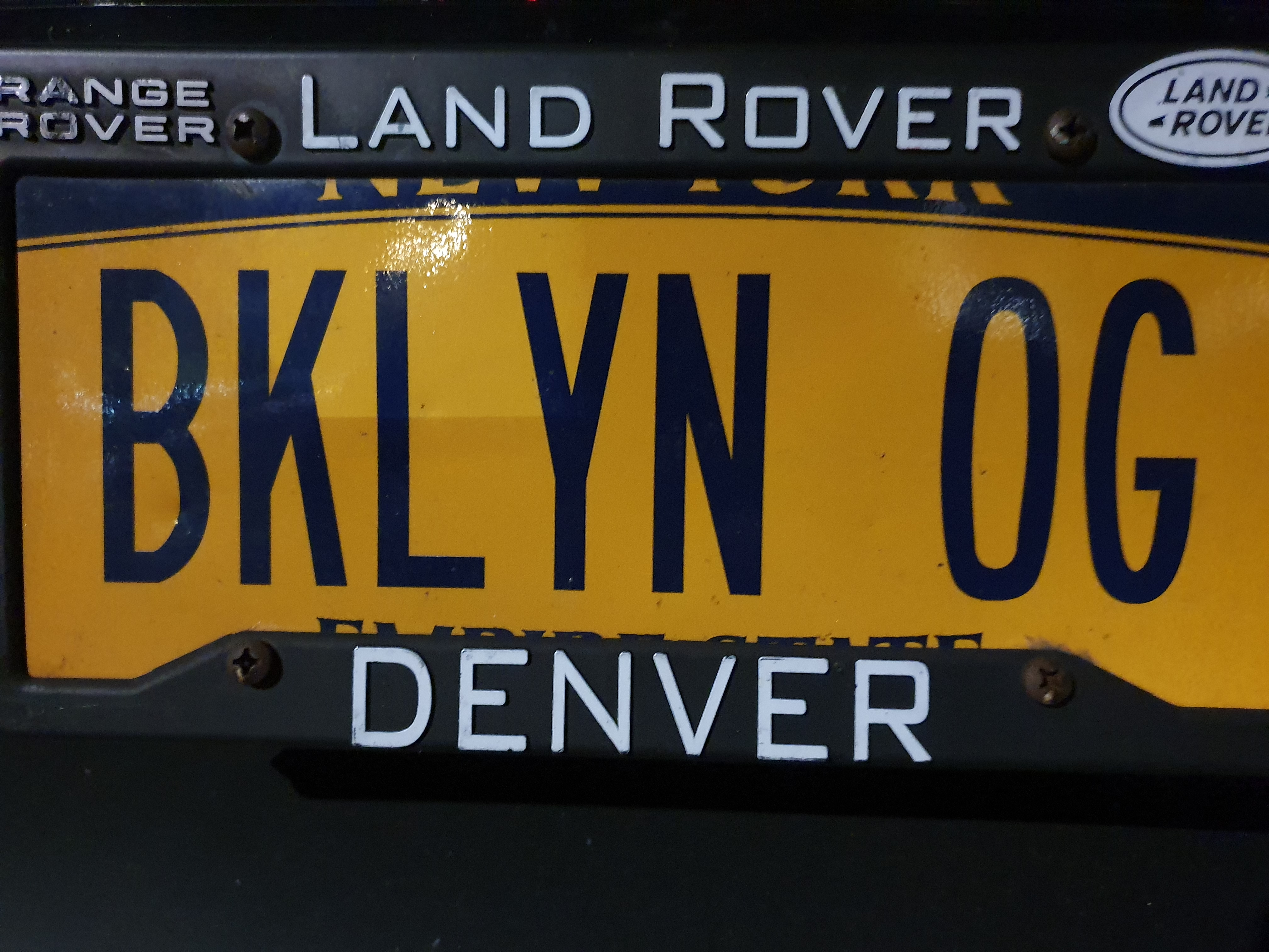 לוחית רישוי ברוקלין